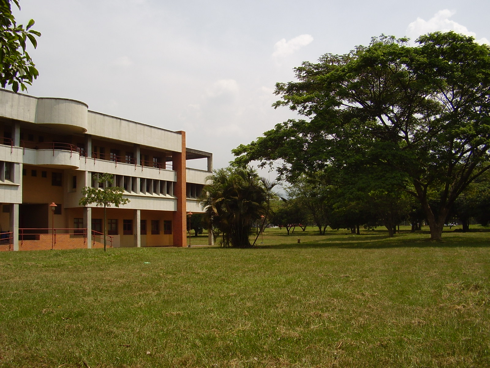 En Univalle Cali-Colombia (Parte trasera)